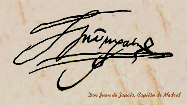 Firma del comunero madrileño Juan de Zapata